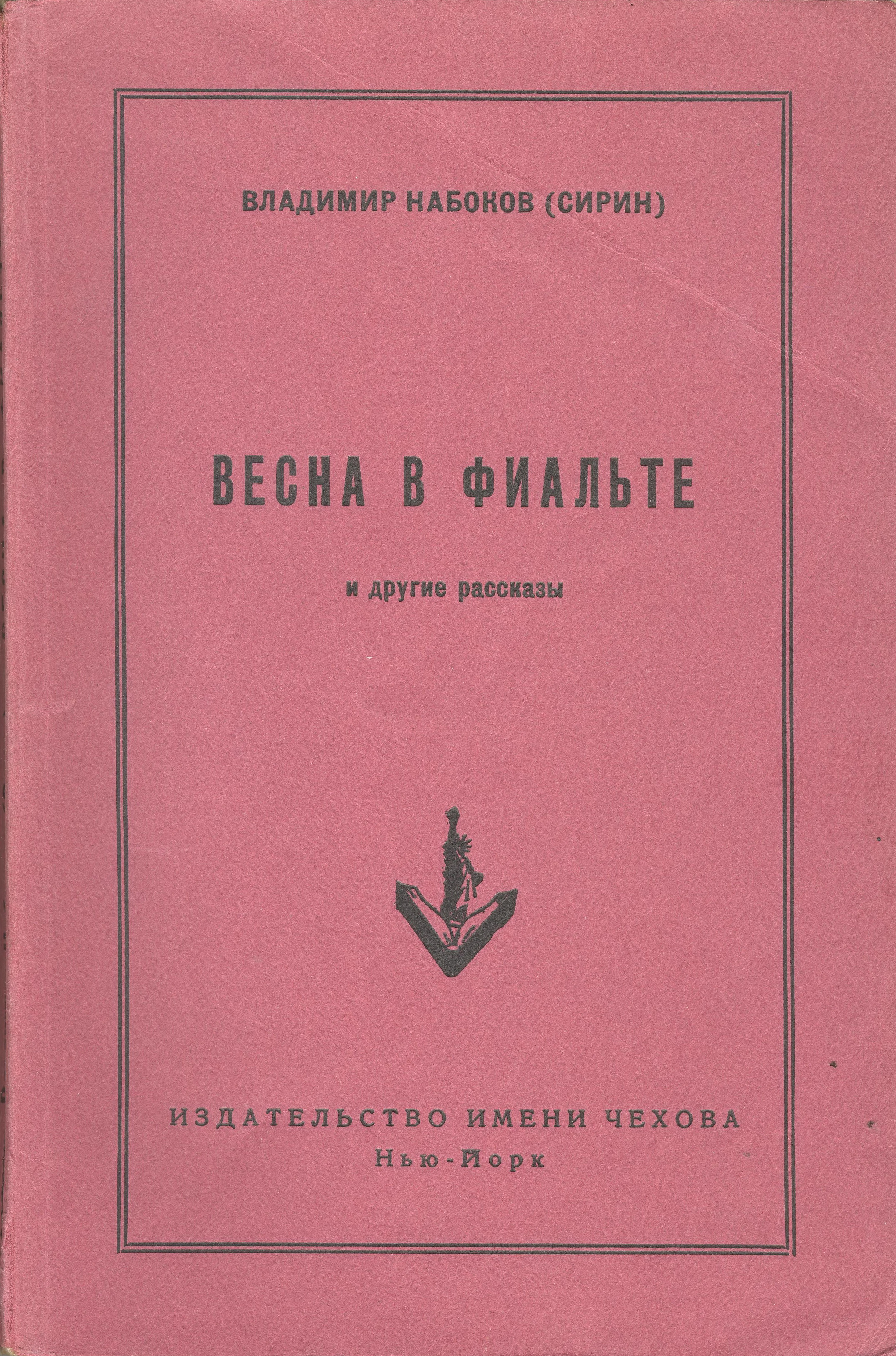 Обложка сборника рассказов В. В. Набокова "Весна в Фиалте" Издательство имени Чехова. Нью-Йорк, 1956